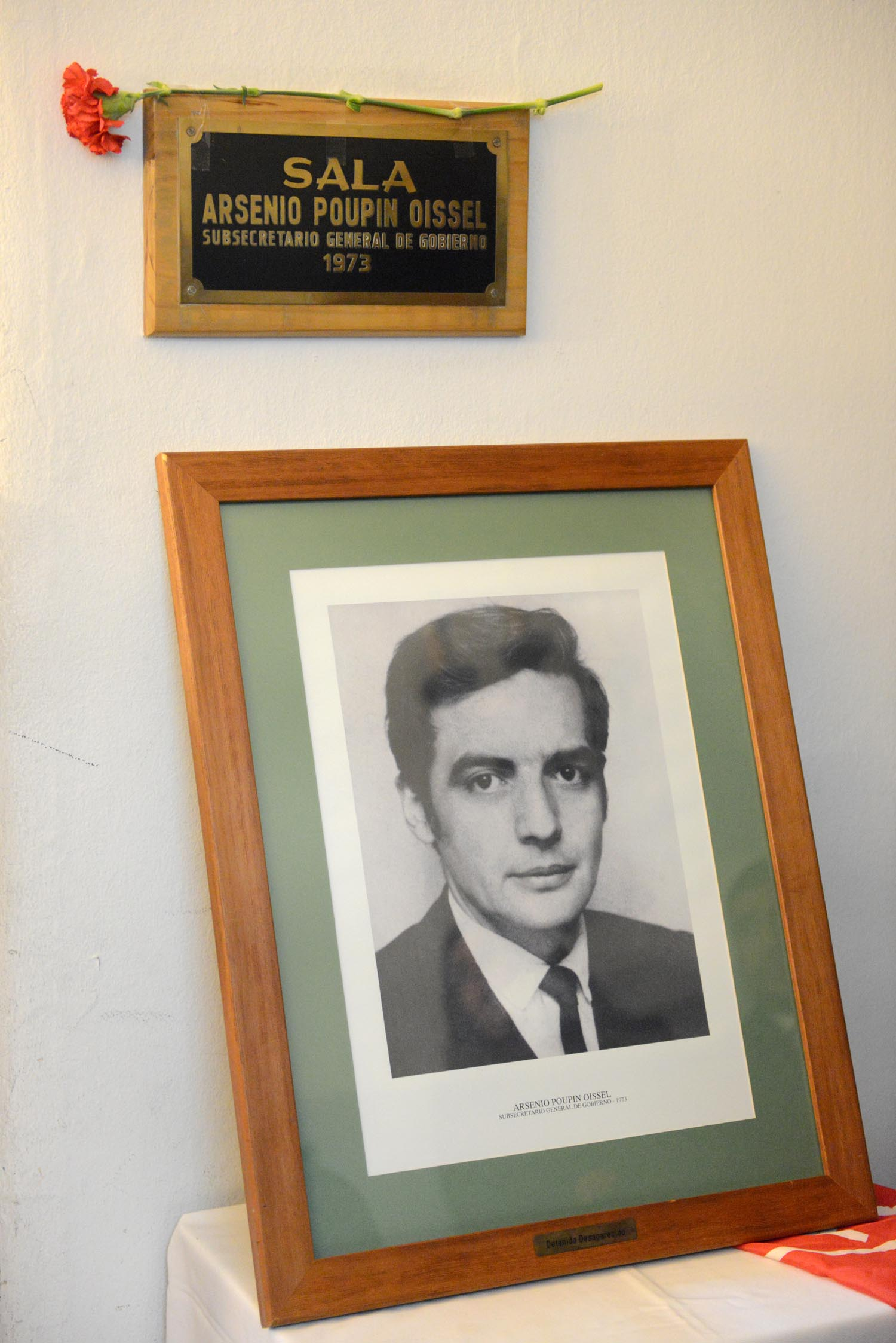 Ceremonia en homenaje al ex subsecretario de la Secretaria General de Gobierno del Presidente Salvador Allende, Arsenio Poupin